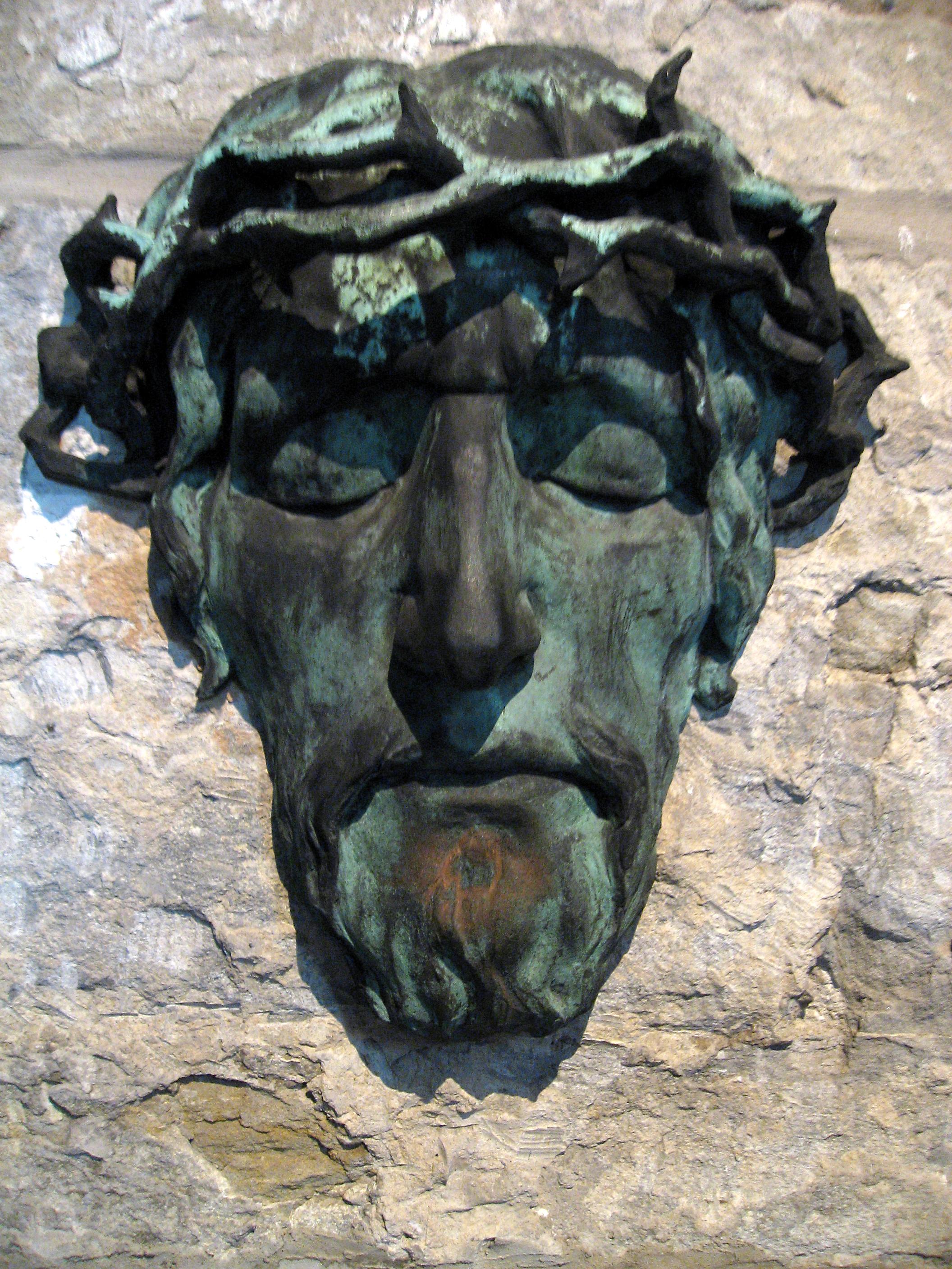 Dortmund, Marienkirche, nördlicher Altarrraum, Jesusskulptur von Benno Ellkan 1905 für das Grab der Familie Feuerbaum